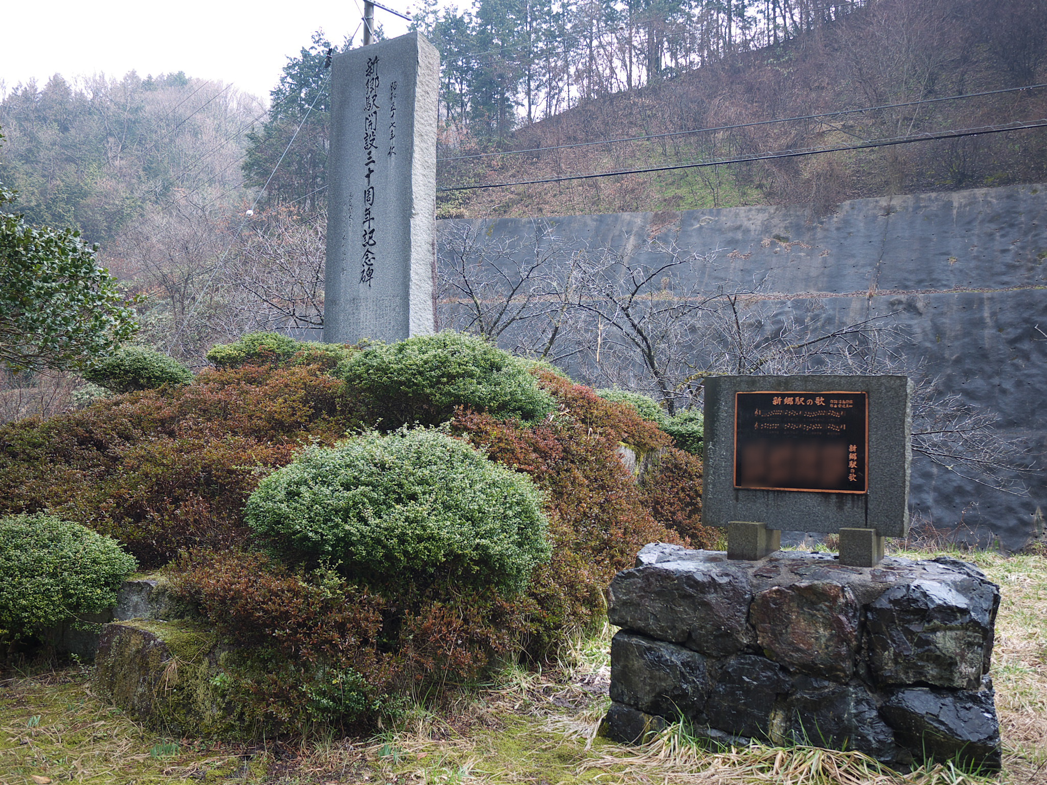 岡山県新見市の新郷駅にある新郷駅開設三十周年記念碑と「新郷駅の歌」の歌詞が書かれた石碑。